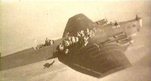 Высадка_парашютного_десанта_с_ТБ-3.Изображение представляет собой кадр из военной кинохроники .